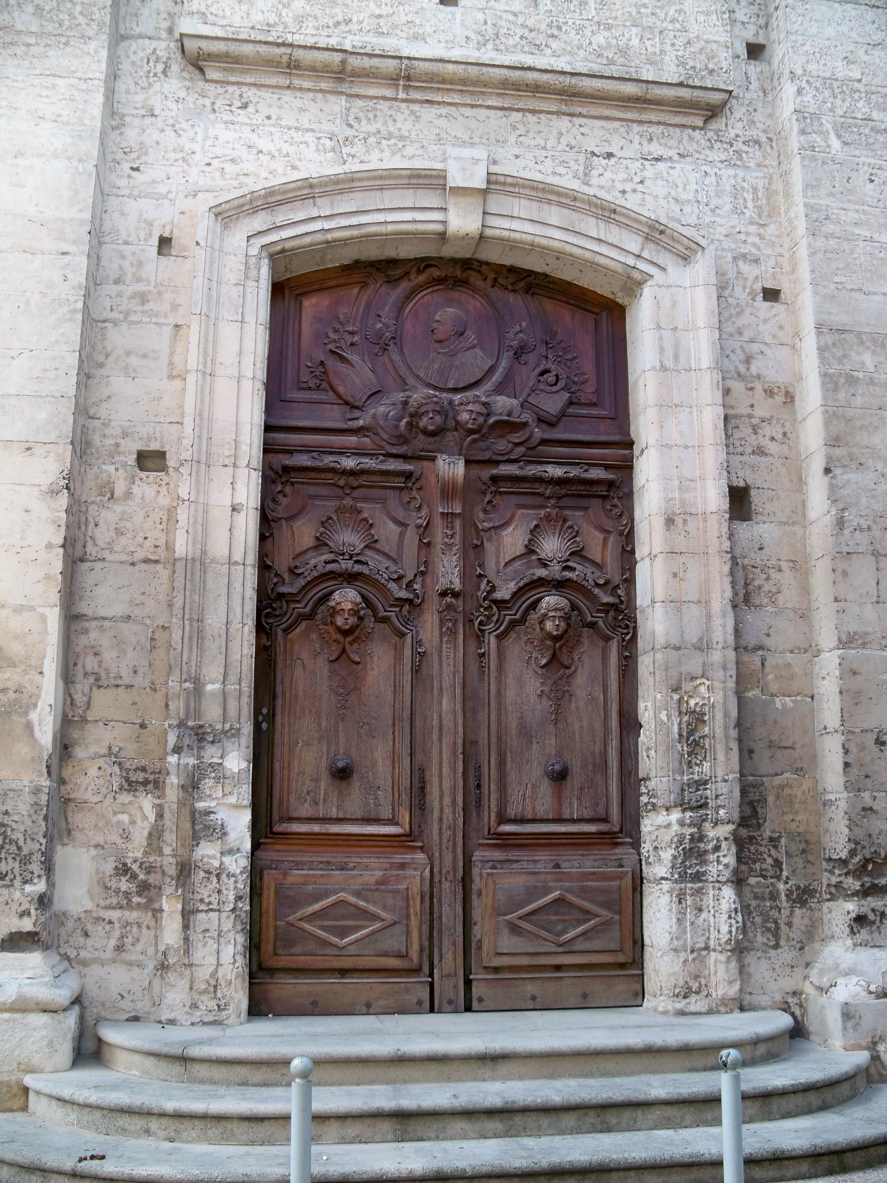 Chapelle Saint-Benoît de Cavaillonélévation (Inscrit) .